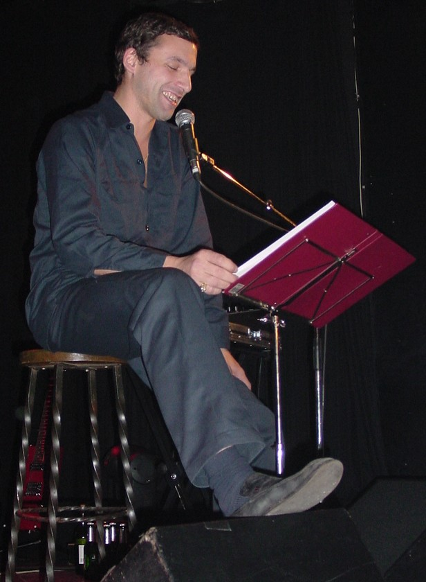 Rocko Schamoni bei Lesung und Konzert mit seiner Band "Little Machine" im Heidelberger Karlstorbahnhof, einige Auszüge aus seinem damals noch unveröffentlichten Roman "Dorfpunks" vorlesend